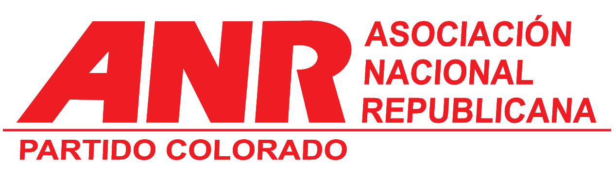 Emblema de la Asociación Nacional Republicana Partido Colorado